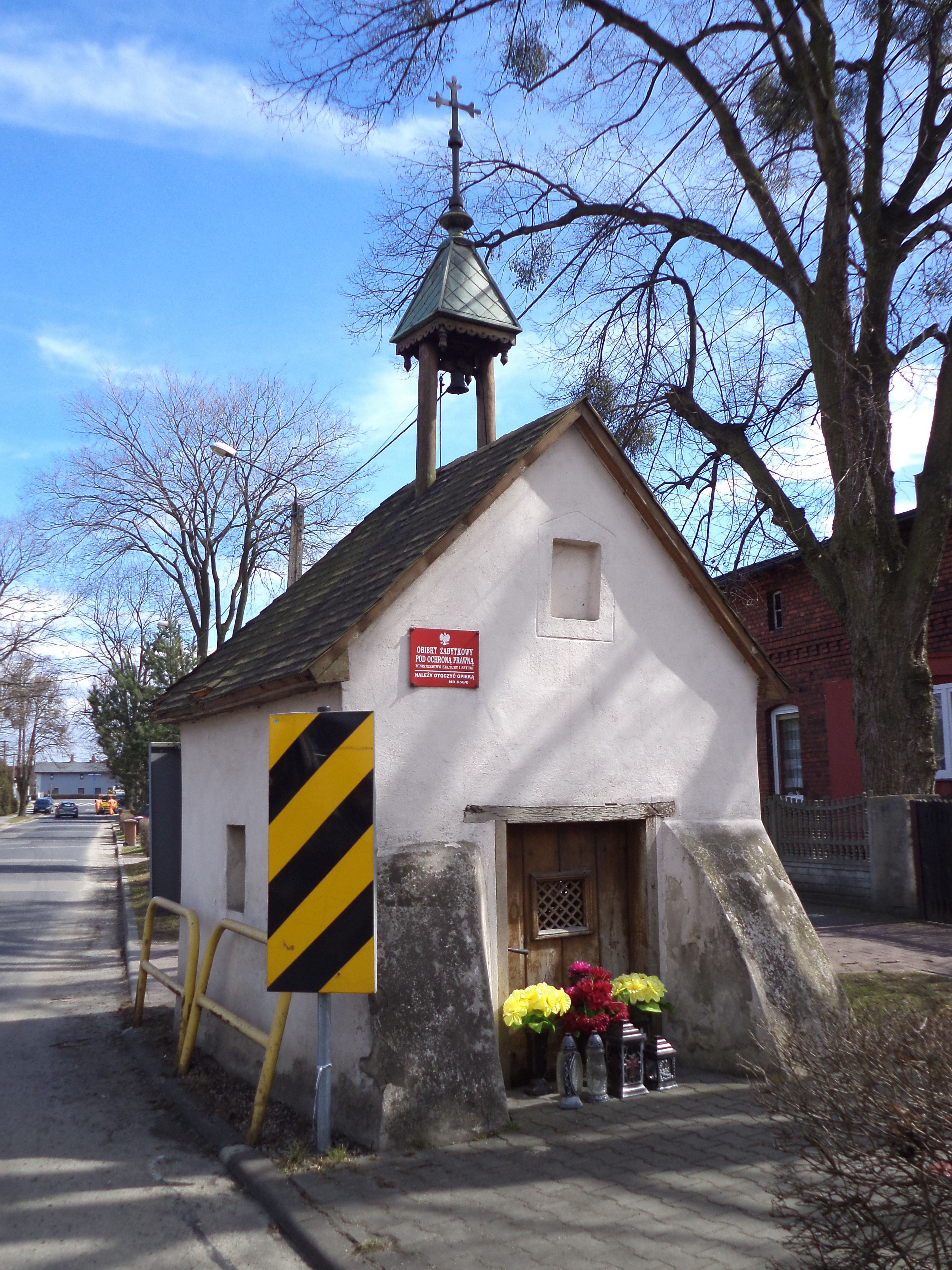 Zabytkowa kapliczka z XIX wieku przy ulicy Głównej w Tarnowskich Górach-Bobrownikach Śląskich